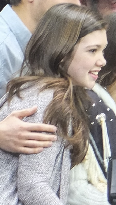 Alisha Newton en 2015 lors d'une convention